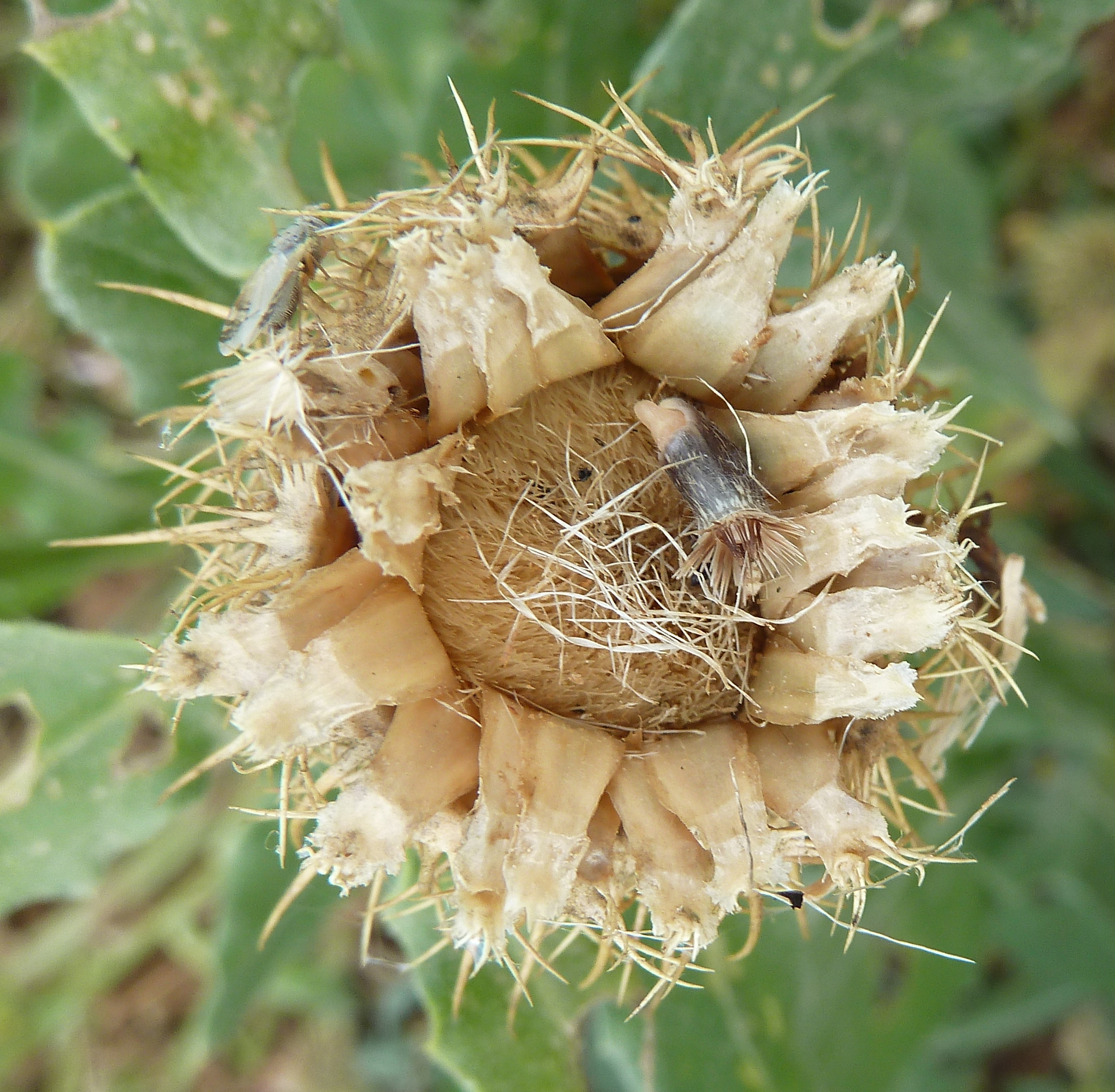 Centaurea pullata (Cabeza de pollo): Receptáculo peludo y cipsela con eleosoma y doble vilano heterómorfo de escamas - Camino de Elche, Albatera (Provincia de Alicante, España).